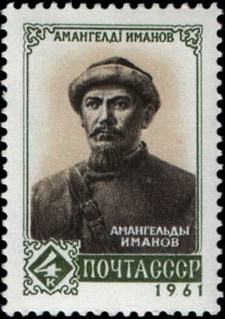 Амангельды Иманов (1873-1919). Почтовая марка СССР 1961г.